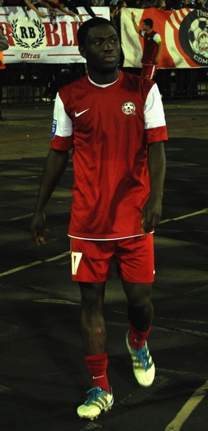 Мишель Бабатунде — нигерийский футболист.